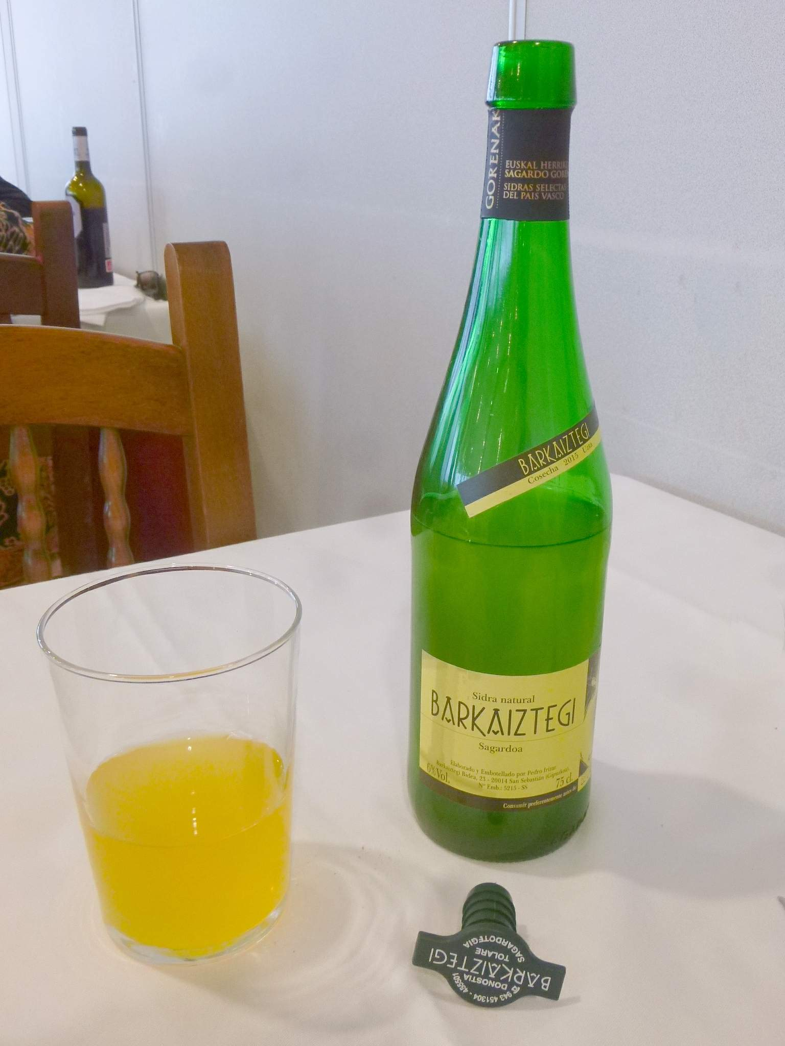 Hernani - Sidra